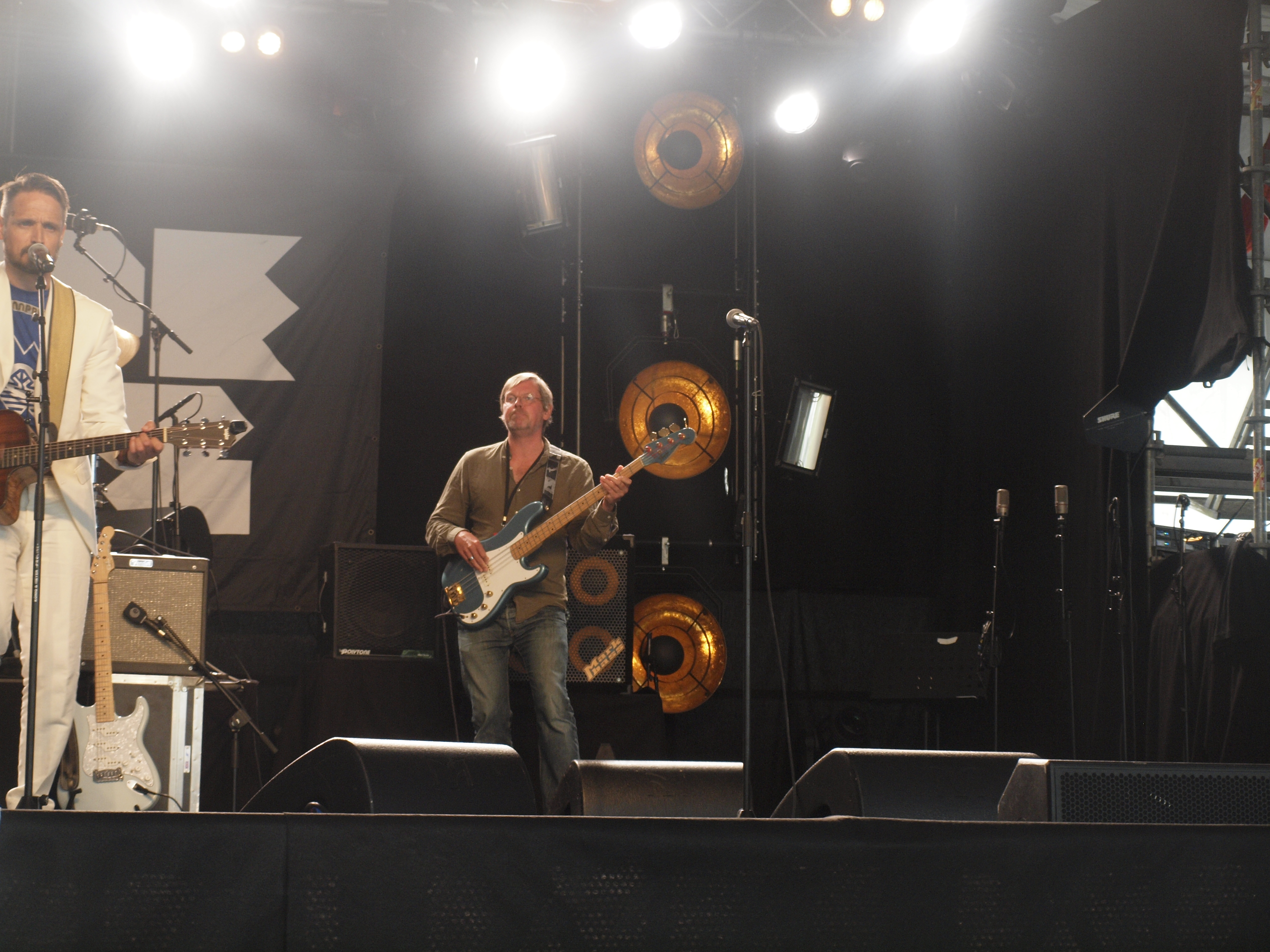 Tom Schaefer Band at Moldejazz 2019 - Audun Skorgen